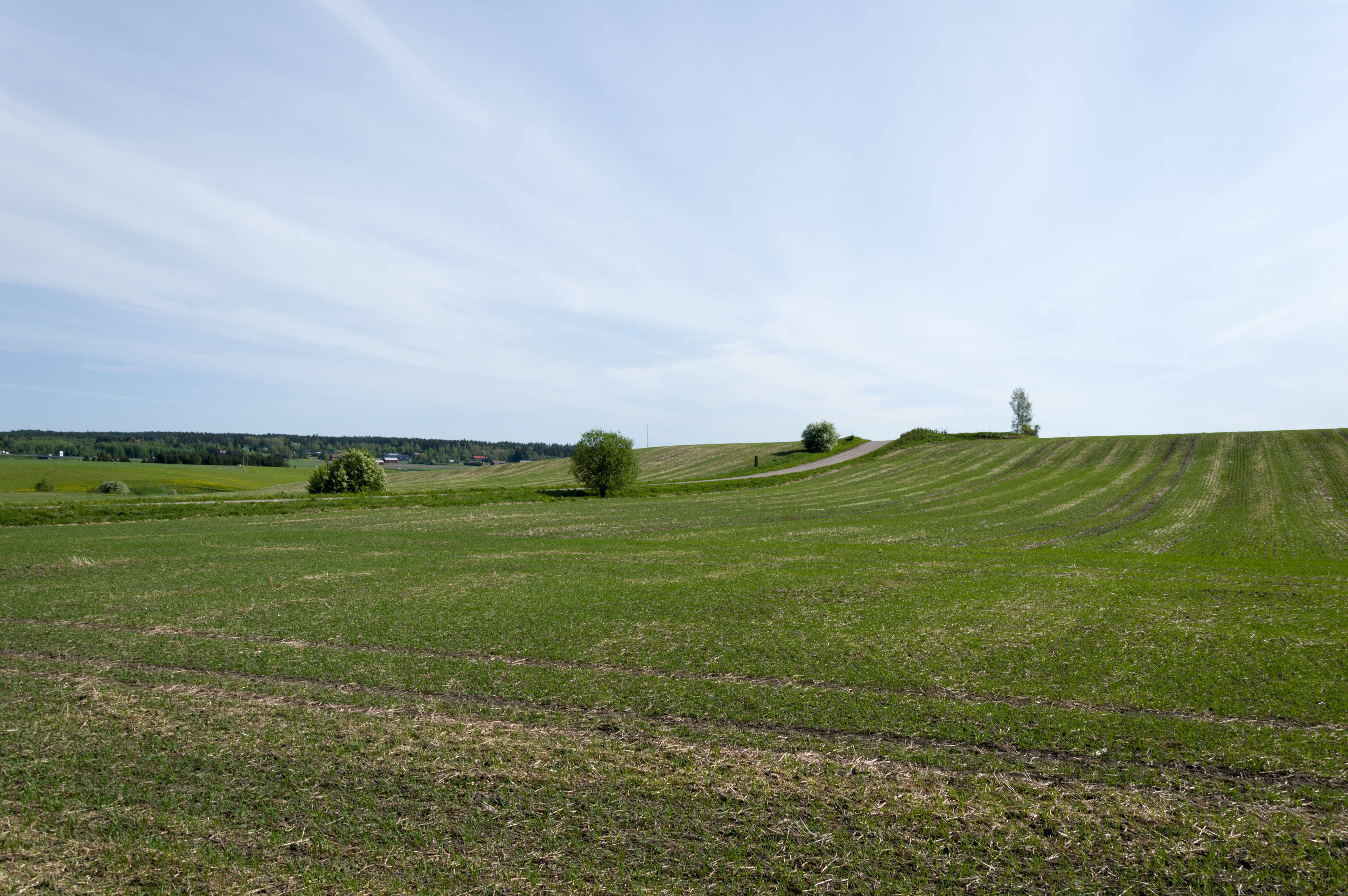 Maanvyory 1770-luvulla Uskelassa josta puhutaan Maamme kirjassa, Veitakkalan kartano vasemmalla